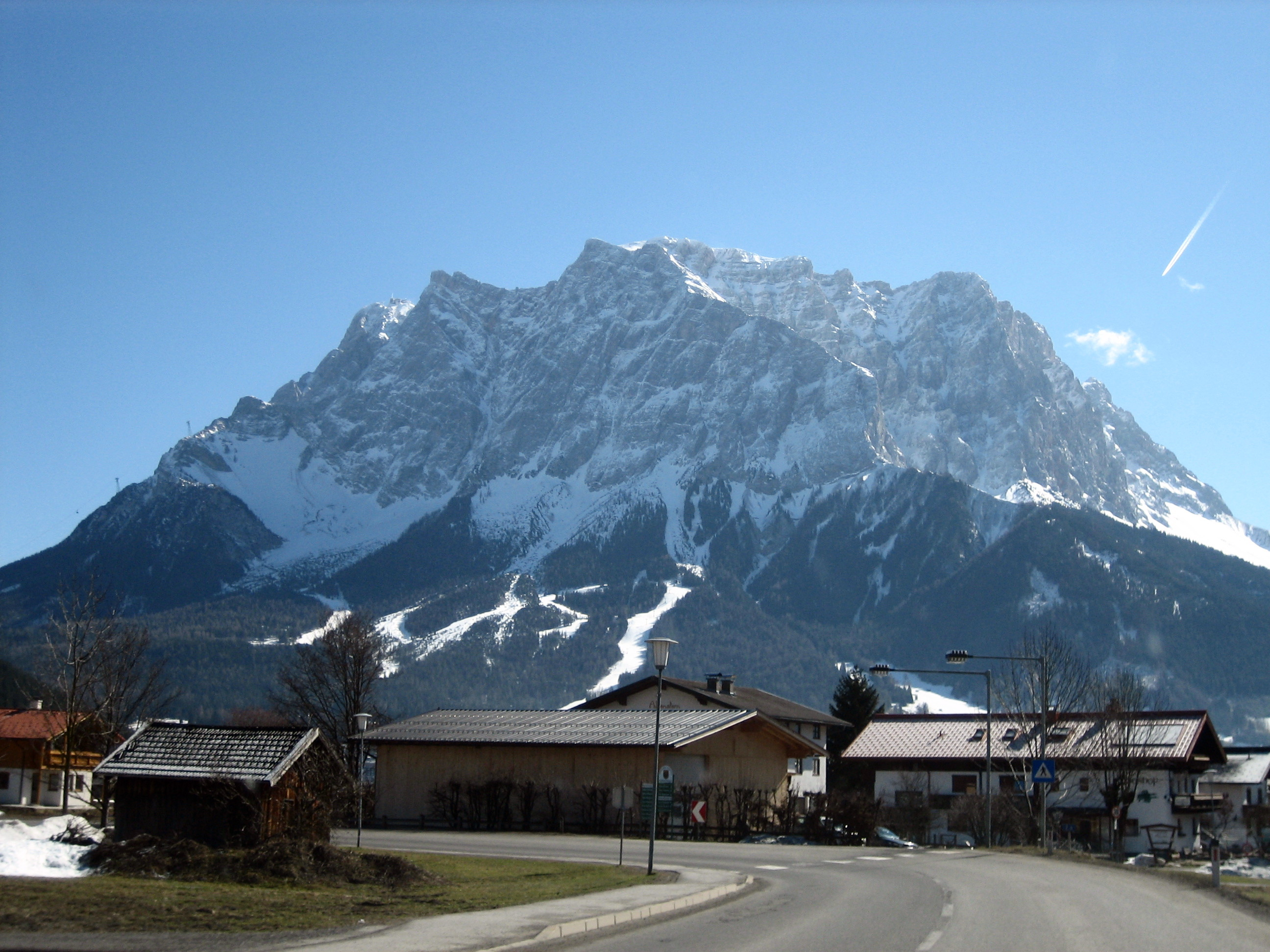 Wettersteinmassiv von Westen aus (aus Lermoos). Der Zugspitzgipfel (ganz links) wird von den Gebäuden auf dem Gipfelplateau verdeckt.